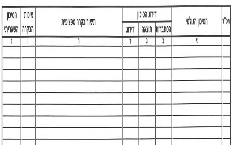 הטופס הראשי להכנת סקר הסיכונים